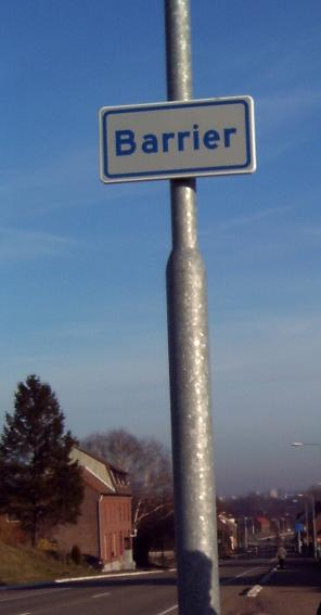 Limburgs: Barrier 2005